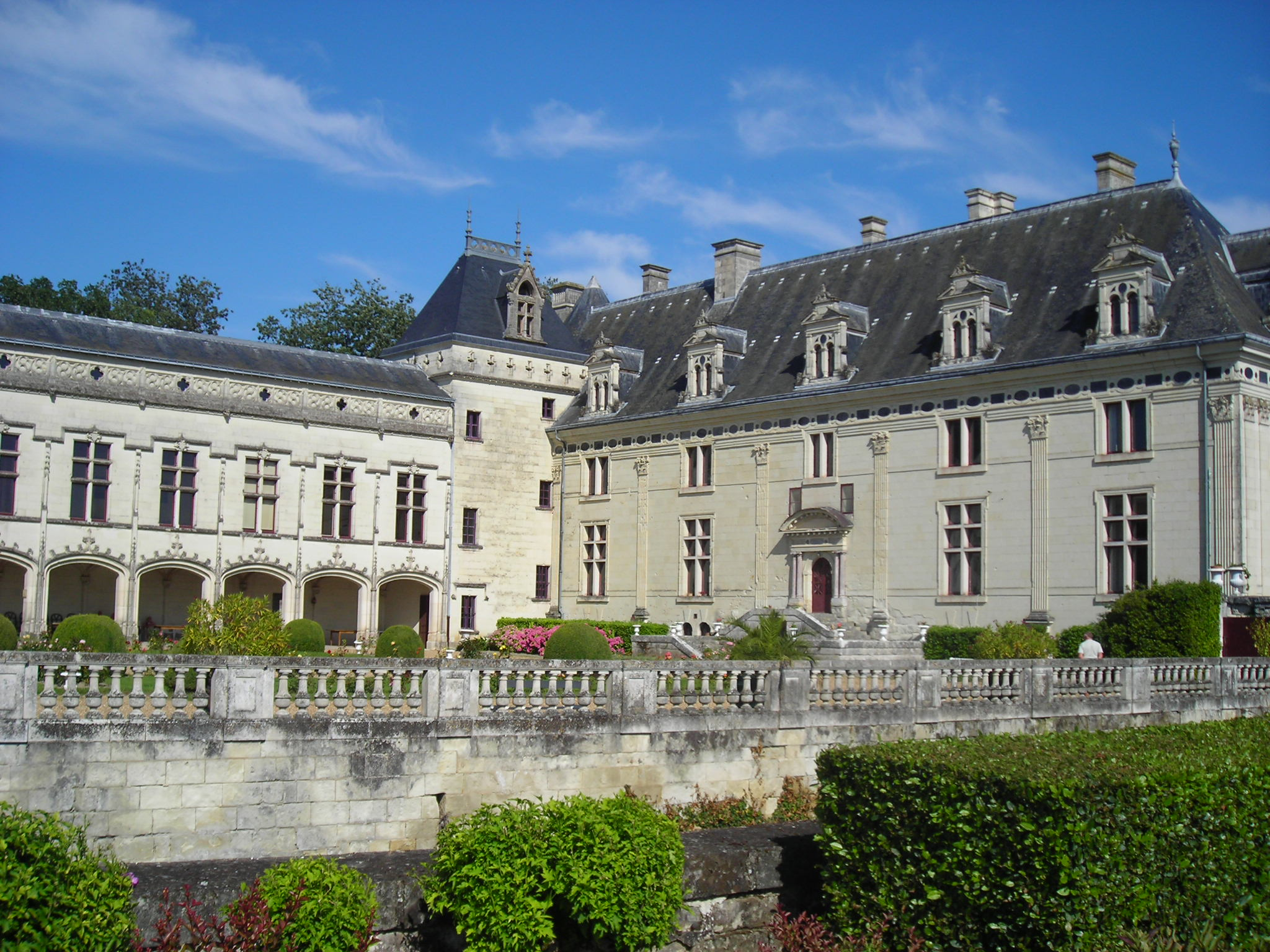 Photo du Château de Brézé